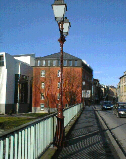 Ettelbréck: Musekkonservatoire vum Norden